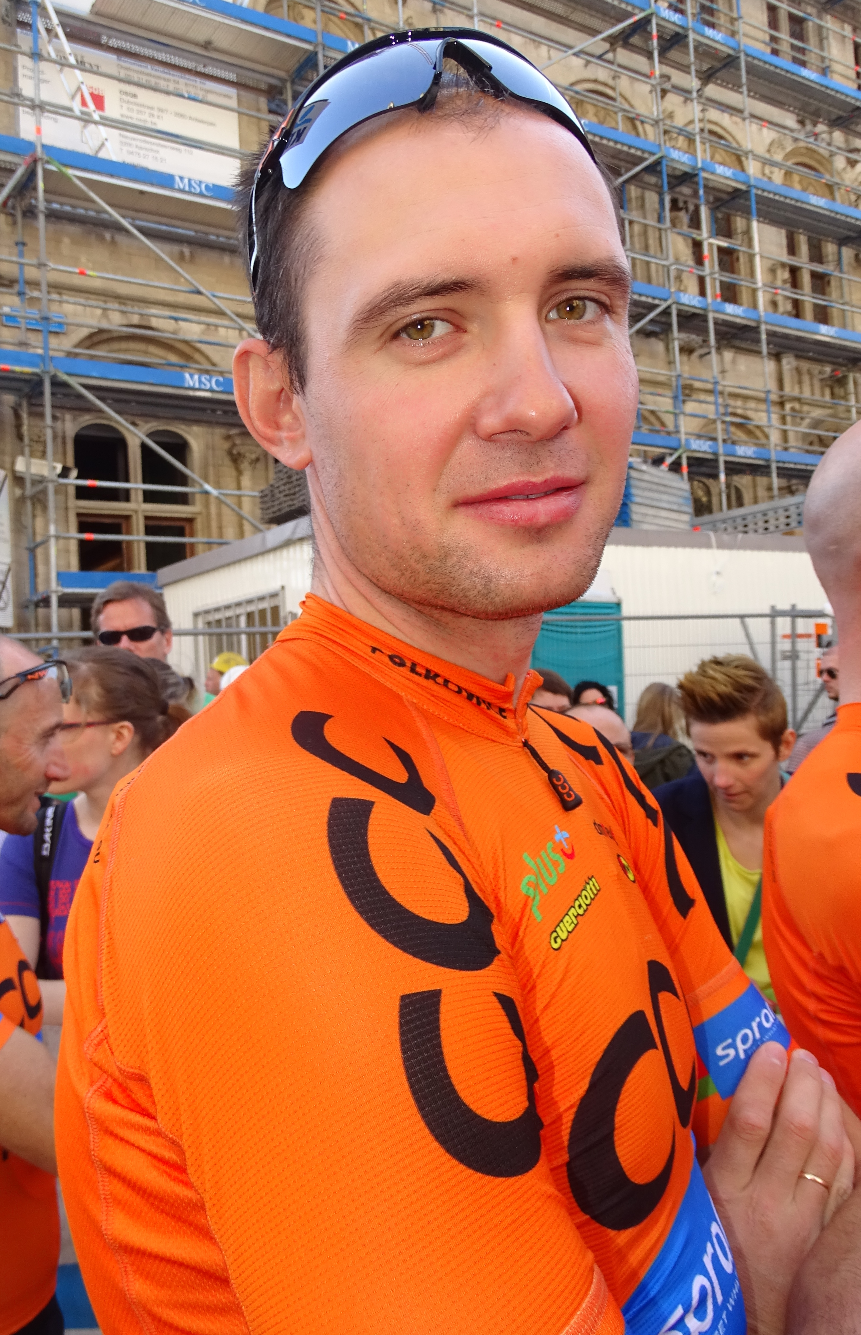 Reportage réalisé le mercredi 15 avril à l'occasion du départ de la Flèche brabançonne 2015 à Louvain, Belgique.